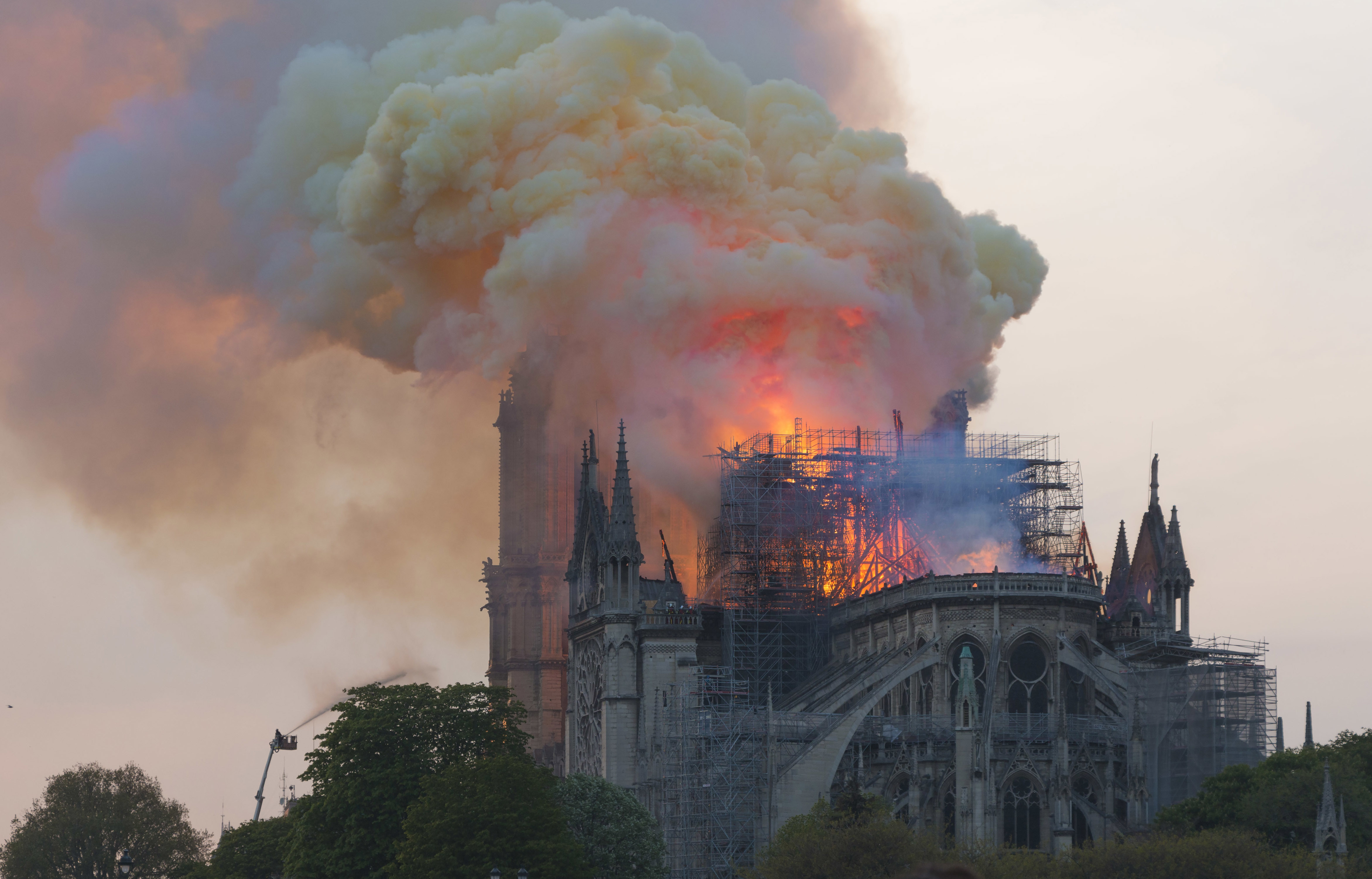 A intervalles relativement réguliers, l'incendie s'intensifie, avec de brusques bouffées de flammes triplant de hauteur et dégageant une fumée jaune.